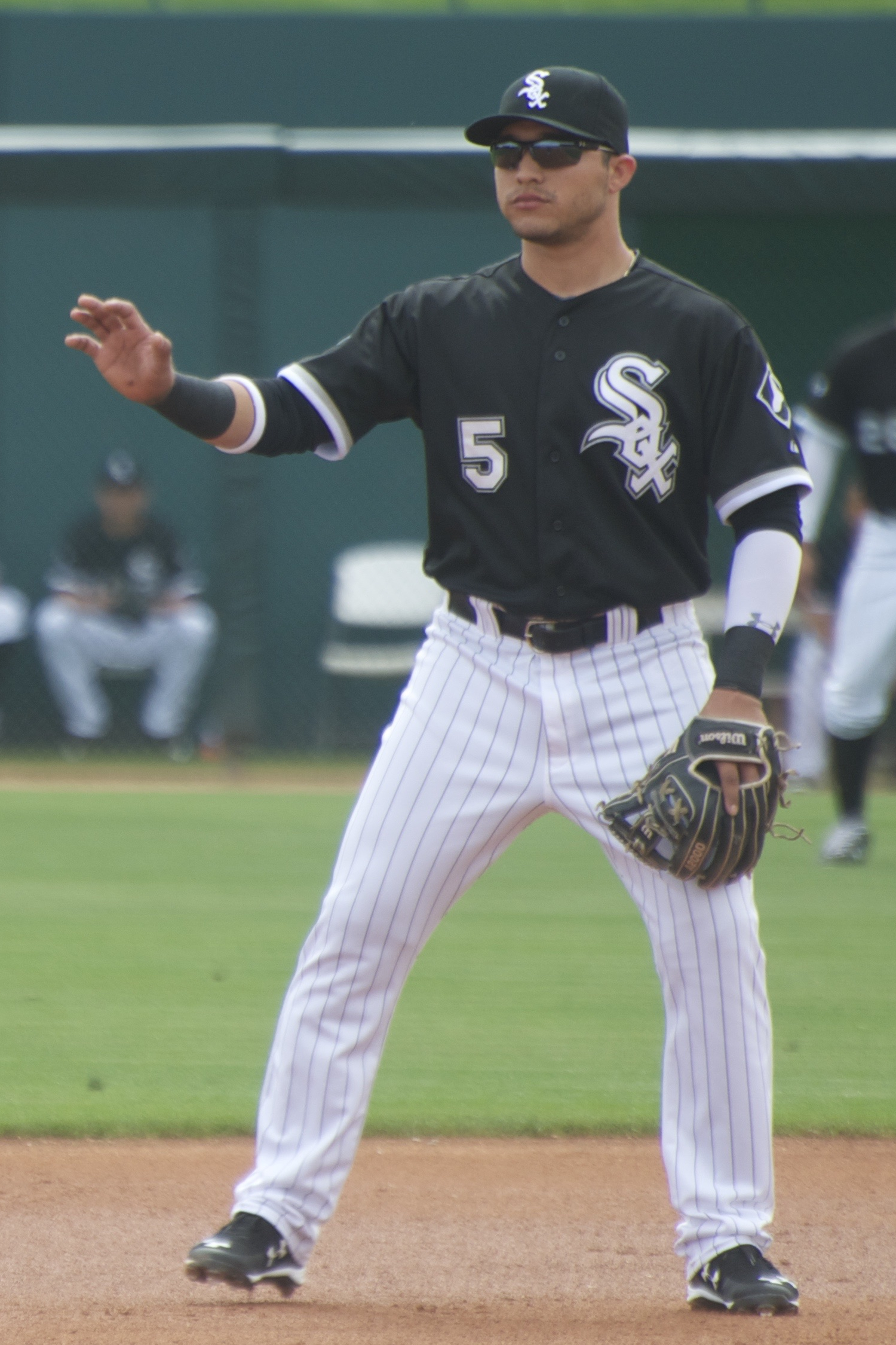 Carlos Sánchez